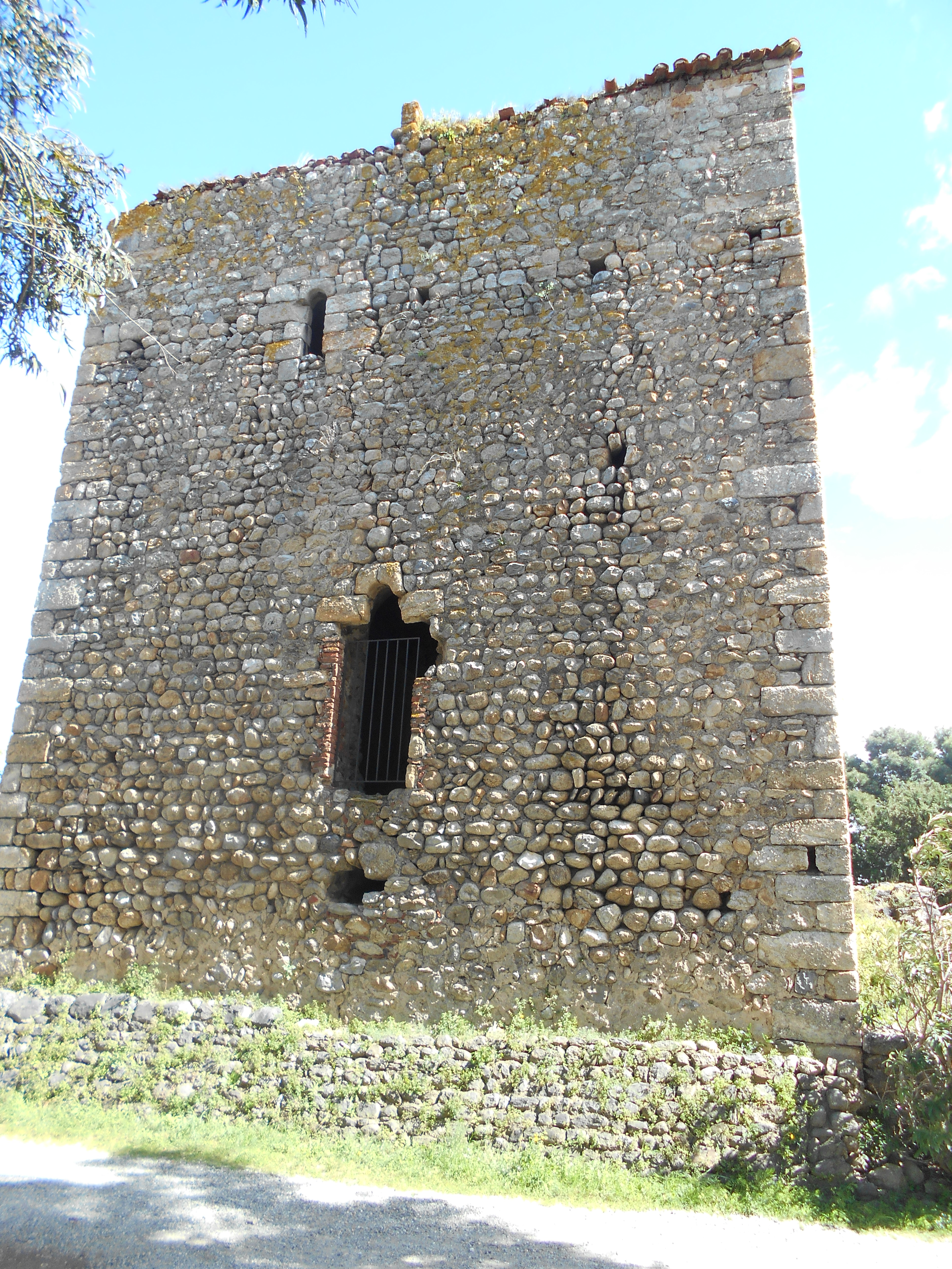 Cara oest de la Torre del Castell de Pujols